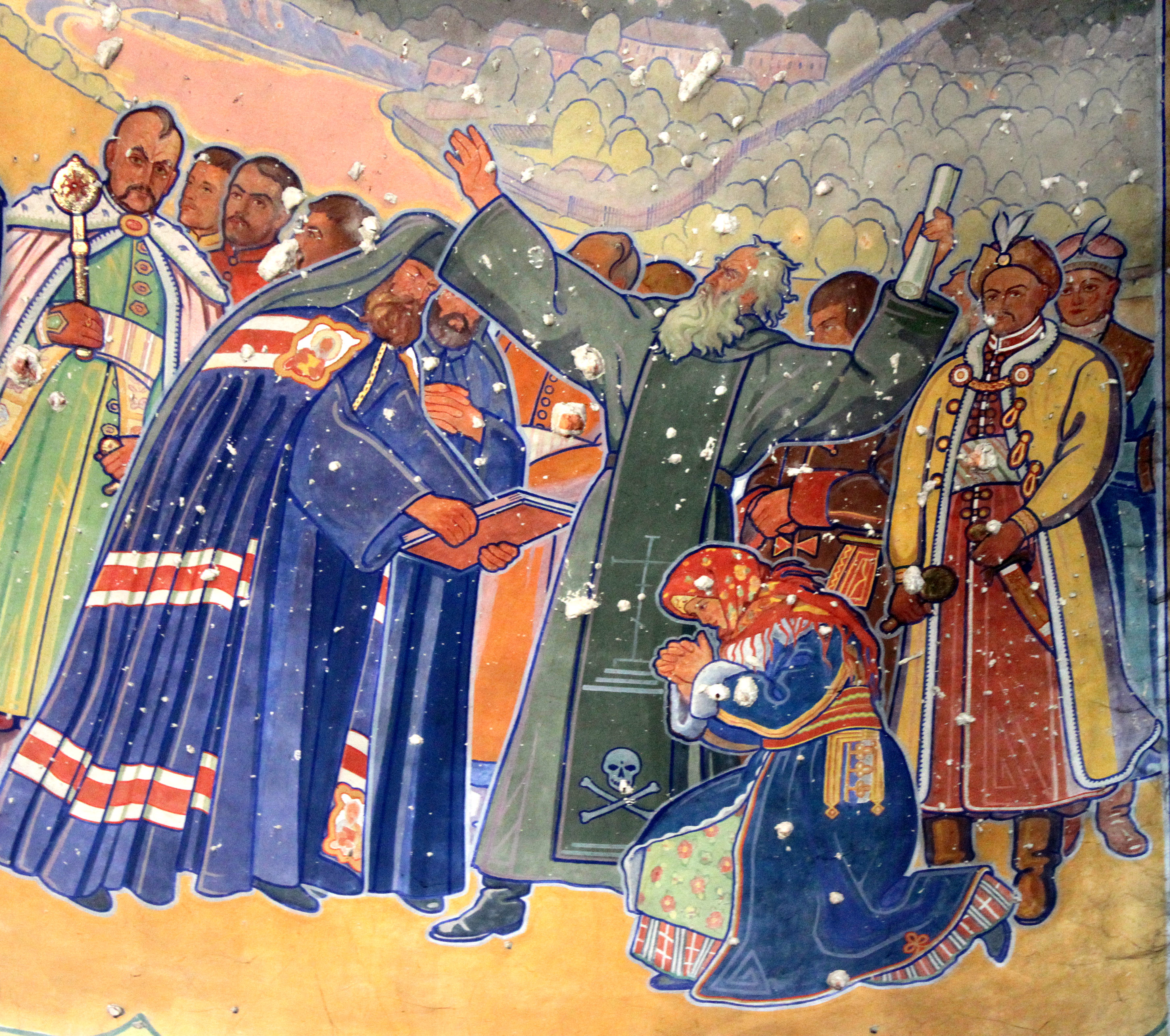 Вцілілий фрагмент фрески роботи Юліана Буцманюка на склепінні василіянського храму у м. Жовкві. На зображенні - Богдан Хмельницький, Іван Вишенський, Іван Мазепа, Гальшка Гулевичівна та інші видатні православні України. На стелі видно сліди від куль, які залишились після перебування в храмі радянських кагебістів.